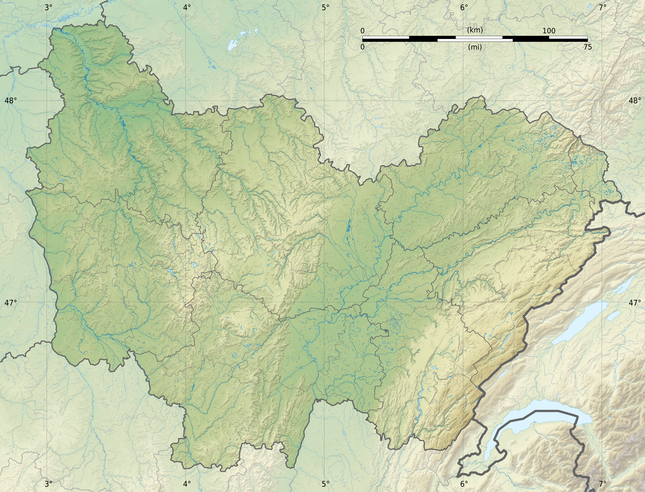 Carte topographique vierge de la région Bourgogne-Franche-Comté, France, destinée à la géolocalisation. Projection "Géoportail" (projection équirectangulaire à la latitude de référence 46.5° Nord) Limites géogrpahiques de la carte : West: 2.663 E East: 7.313 E North: 48.502 N South: 46.058 N